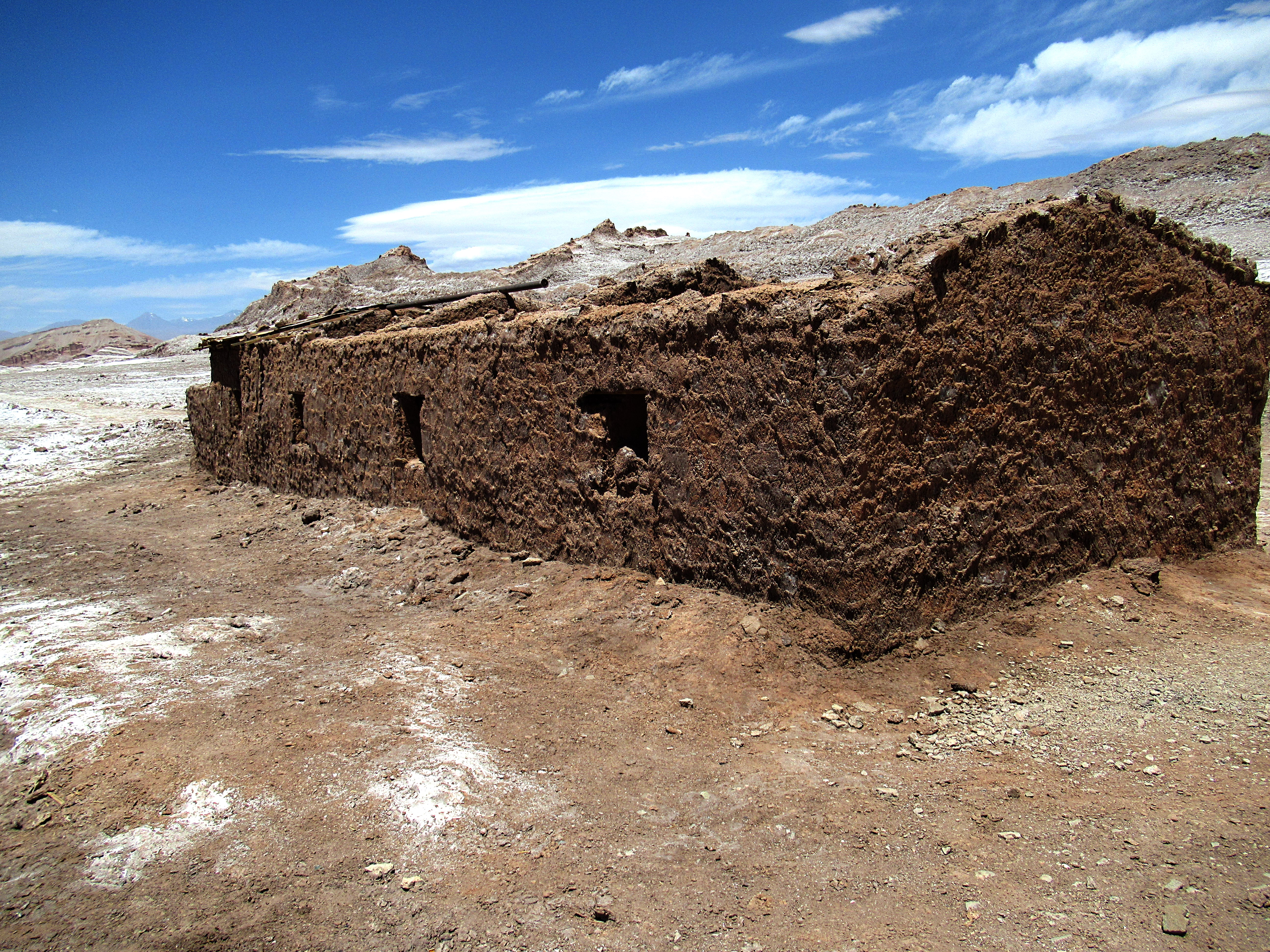 Casa habitacional de la salina Crisanta. Construida con bloques de sal, alrededor de 1930/1940. Cuenta con 4 habitaciones y una cocina. Ubicada 2490 m s.n.m. en la Cordillera de la Sal, San Pedro de Atacama, Chile.